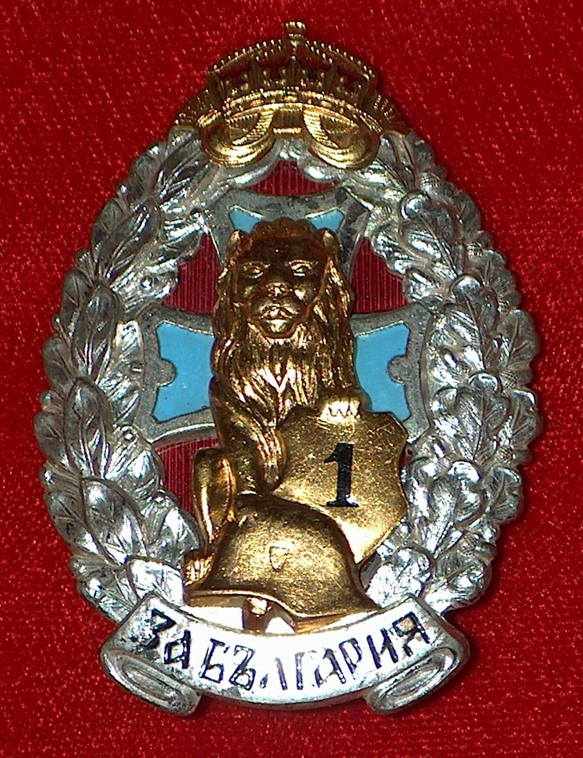 Знак за Раняване 1-ва степен, даван за 1-во раняване в втората световна воина. Отменен през 1946-1948 аверс